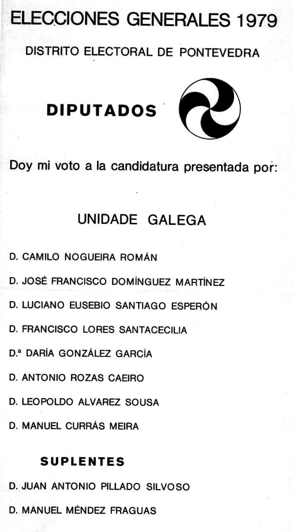 Elecciones generales 1979 Distrito electoral de Pontevedra. Diputados. Unidade Galega